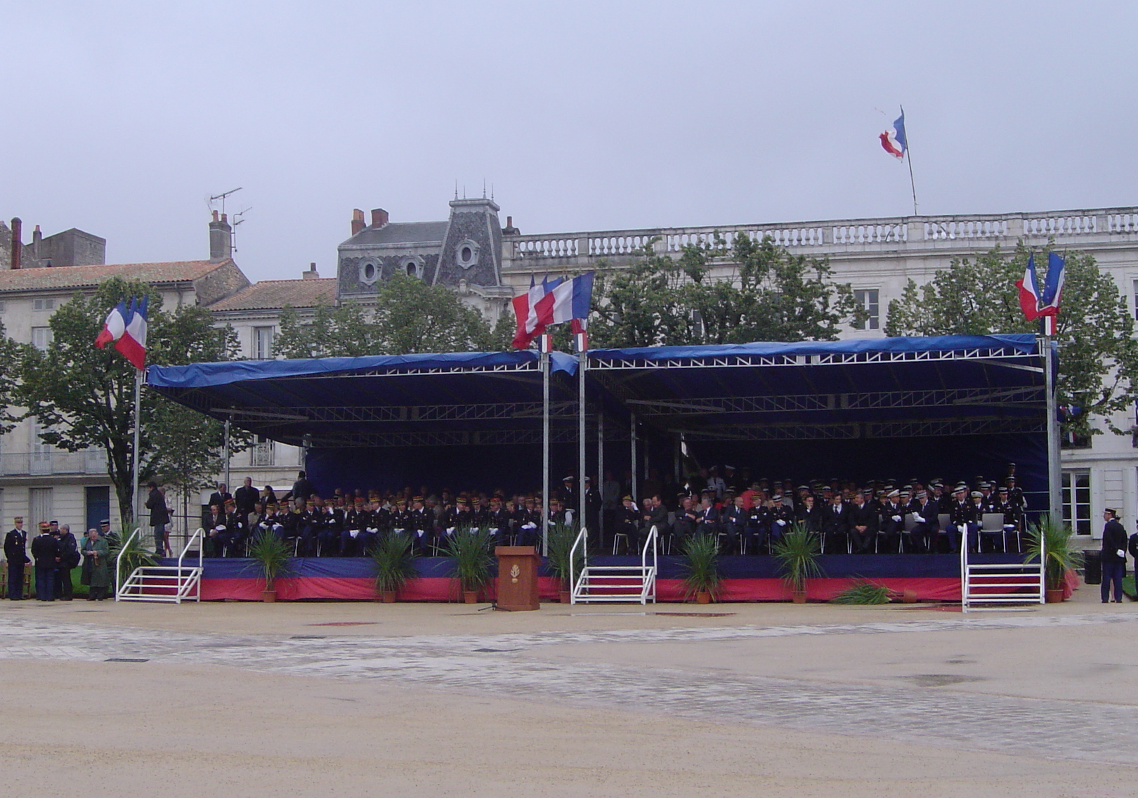 Cérémonie militaire, place Colbert à Rochefort, pour le départ du chef du commandement des écoles de gendarmerie implanté à Rochefort